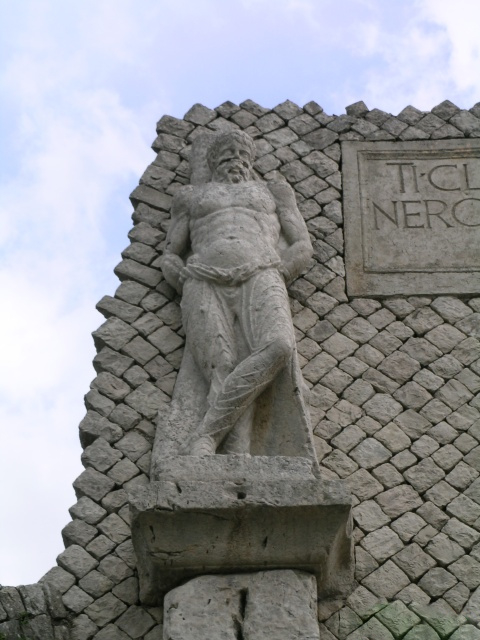 Area archeologica di Saepinum ad Altilia, frazione di Sepino (CB): statua raffigurante un barbaro prigioniero, sulla sinistra dell'arco di Porta Bojano.